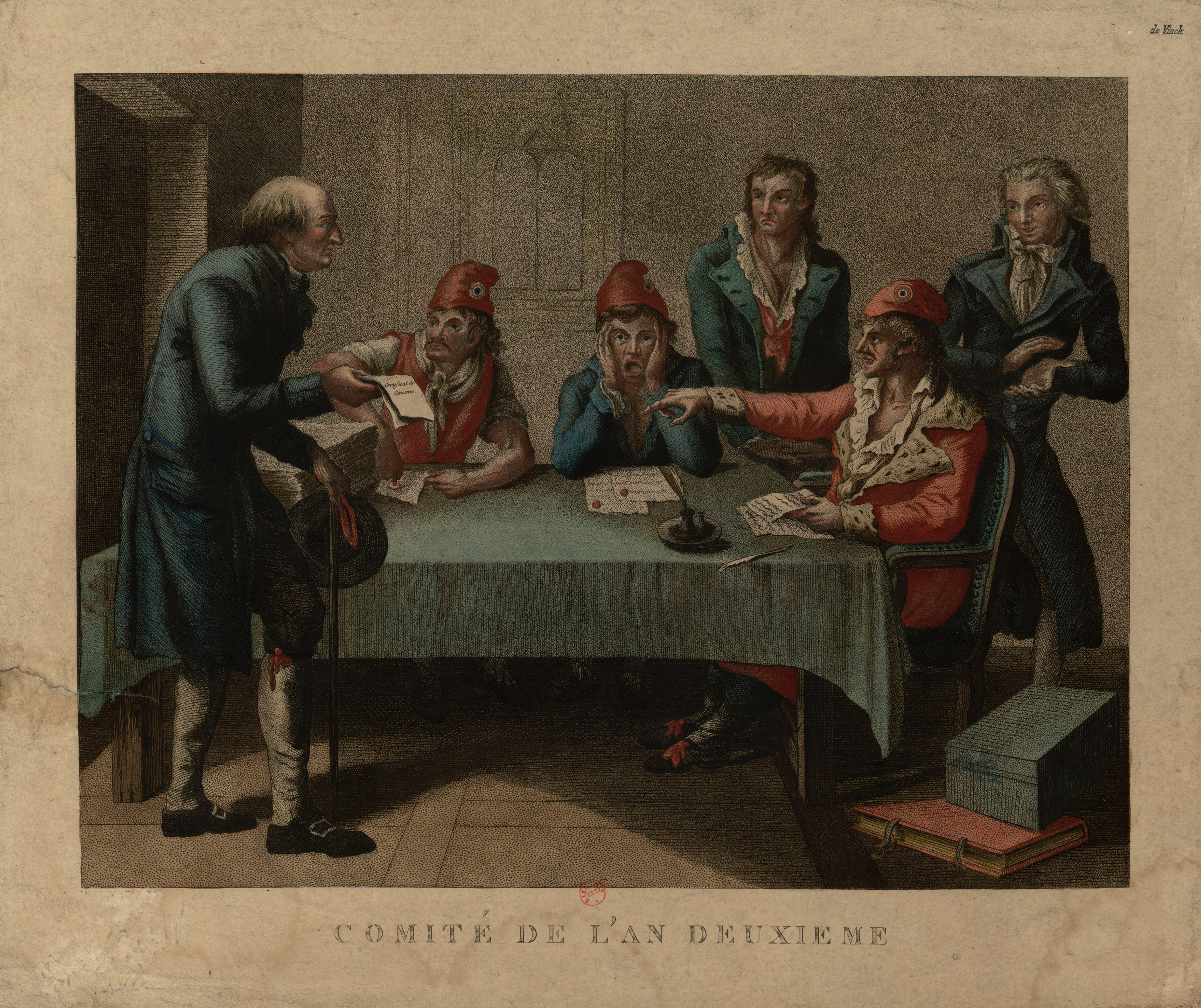 Comité de l'an deuxième. Estampe représentant un Comité de surveillance révolutionnaire de section parisienne de l'an II, d'après Jean-Baptiste Huet. (Bibliothèque nationale de France, Paris.) On y voit des sans-culottes délivrer un certificat de civisme à un vieux citoyen.